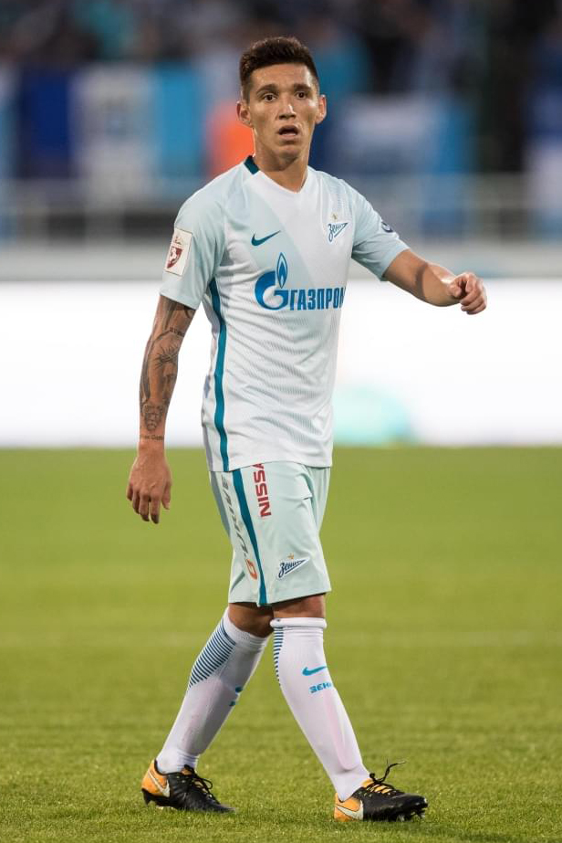 09.08.2017. Россия, Екатеринбург, «СКБ-Банк Арена». РОСГОССТРАХ-Чемпионат России 2017/2018, 5-й тур, «Урал» — «Зенит».